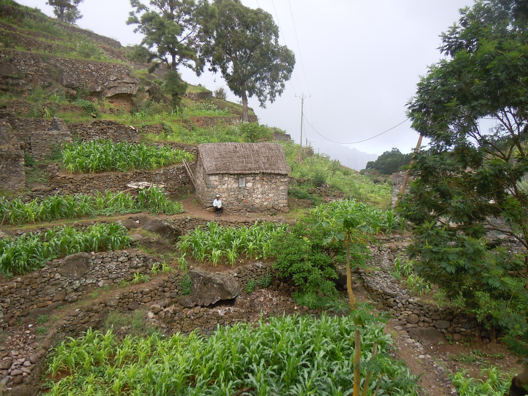 maison traditionnelle couverte d'un toit de chaume sur l'île de Santo Antao (Cap-Vert)